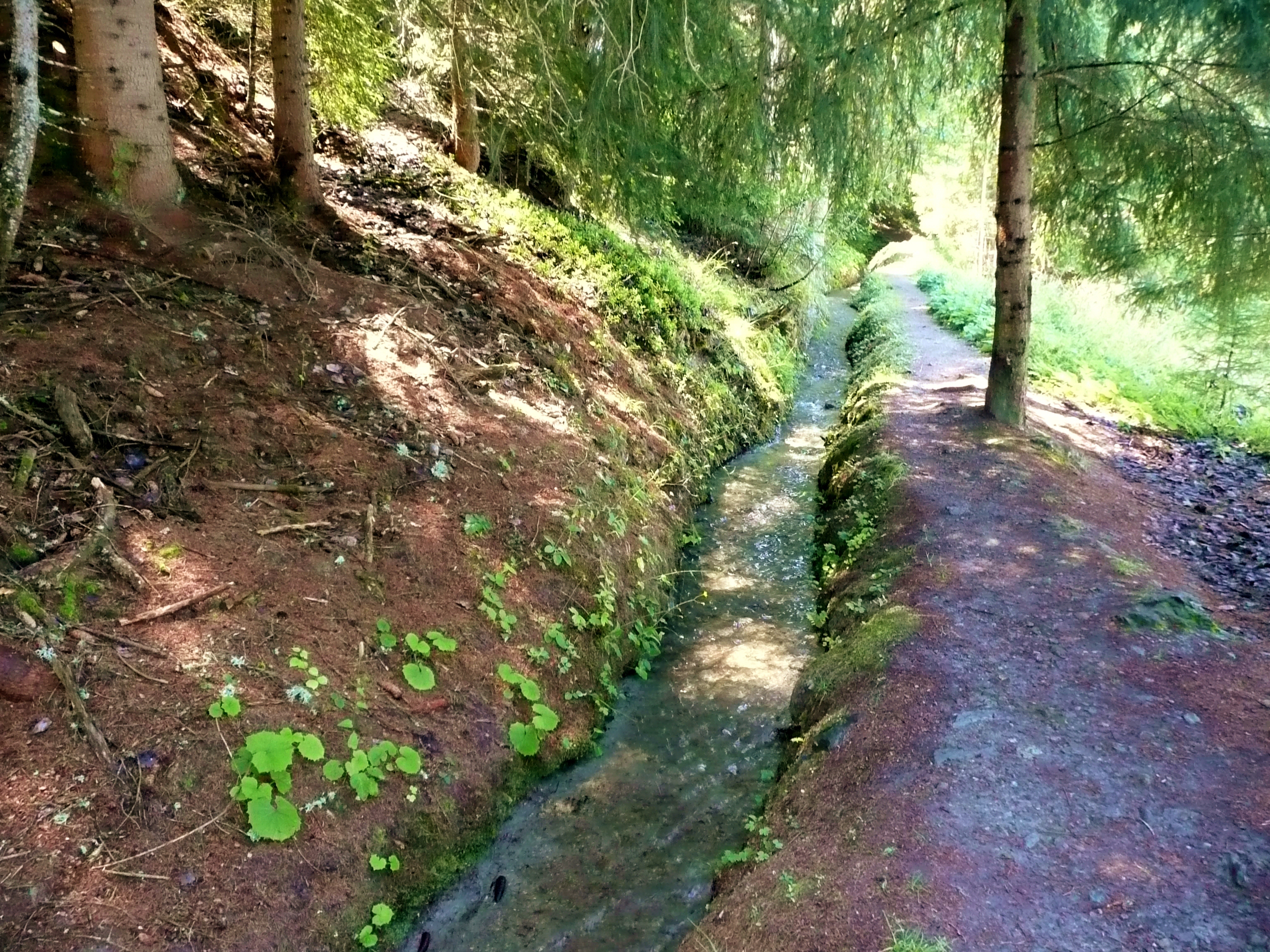 Bisse de Vercorin im Val de Réchy beim Ferienort Vercorin im Schweizerischen Kanton Wallis.